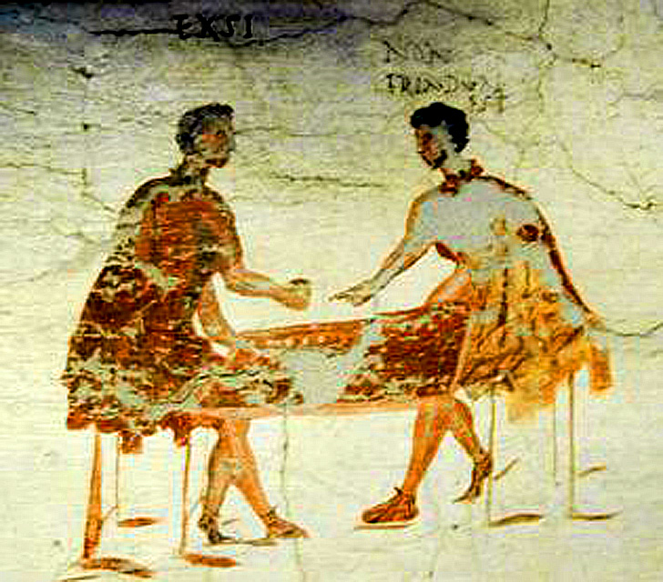 Caupona de Salvius Pompéi clients jouant aux dés